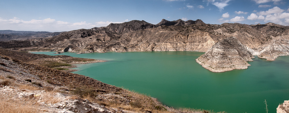 Big dam in Almería